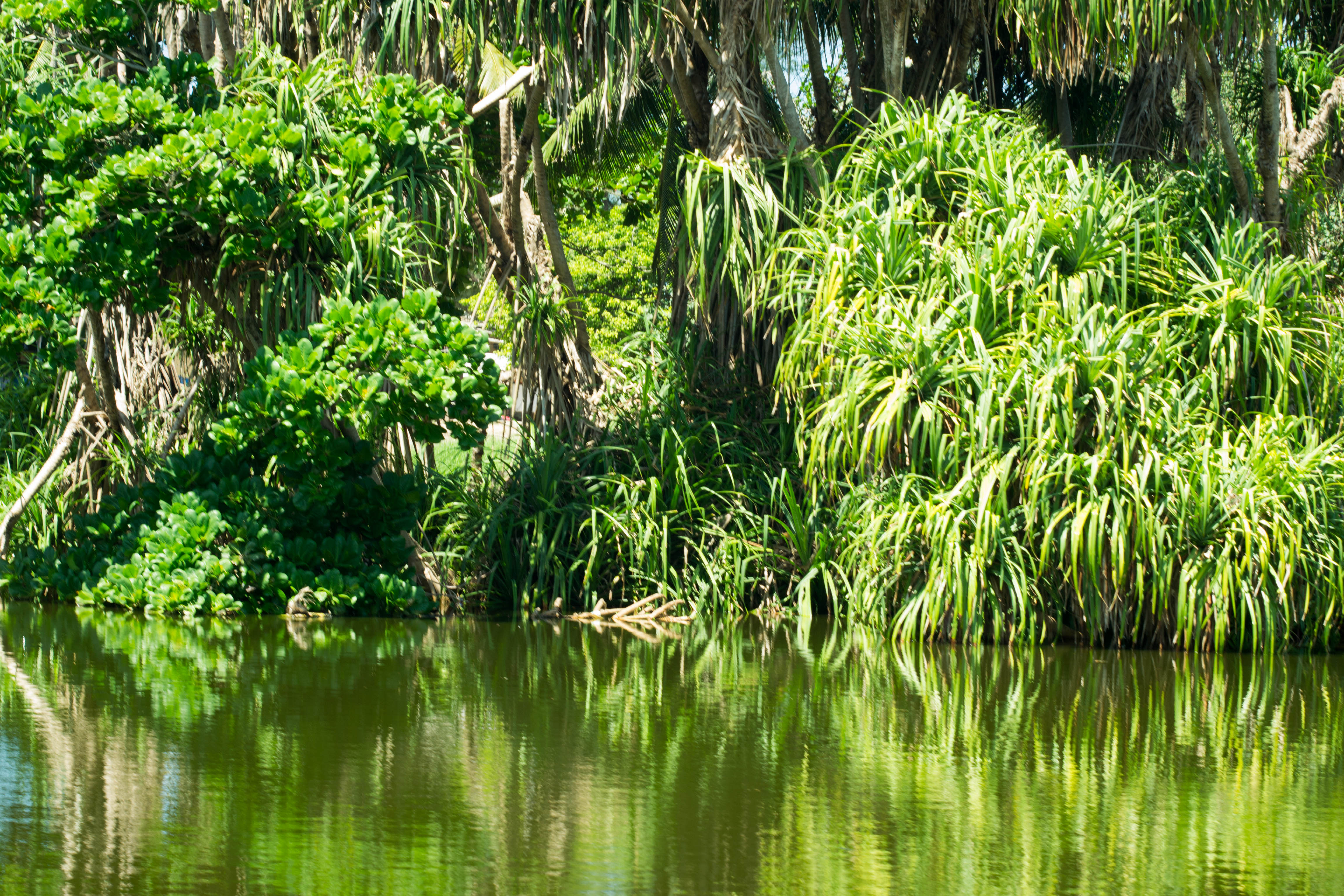 Flora Marapendi